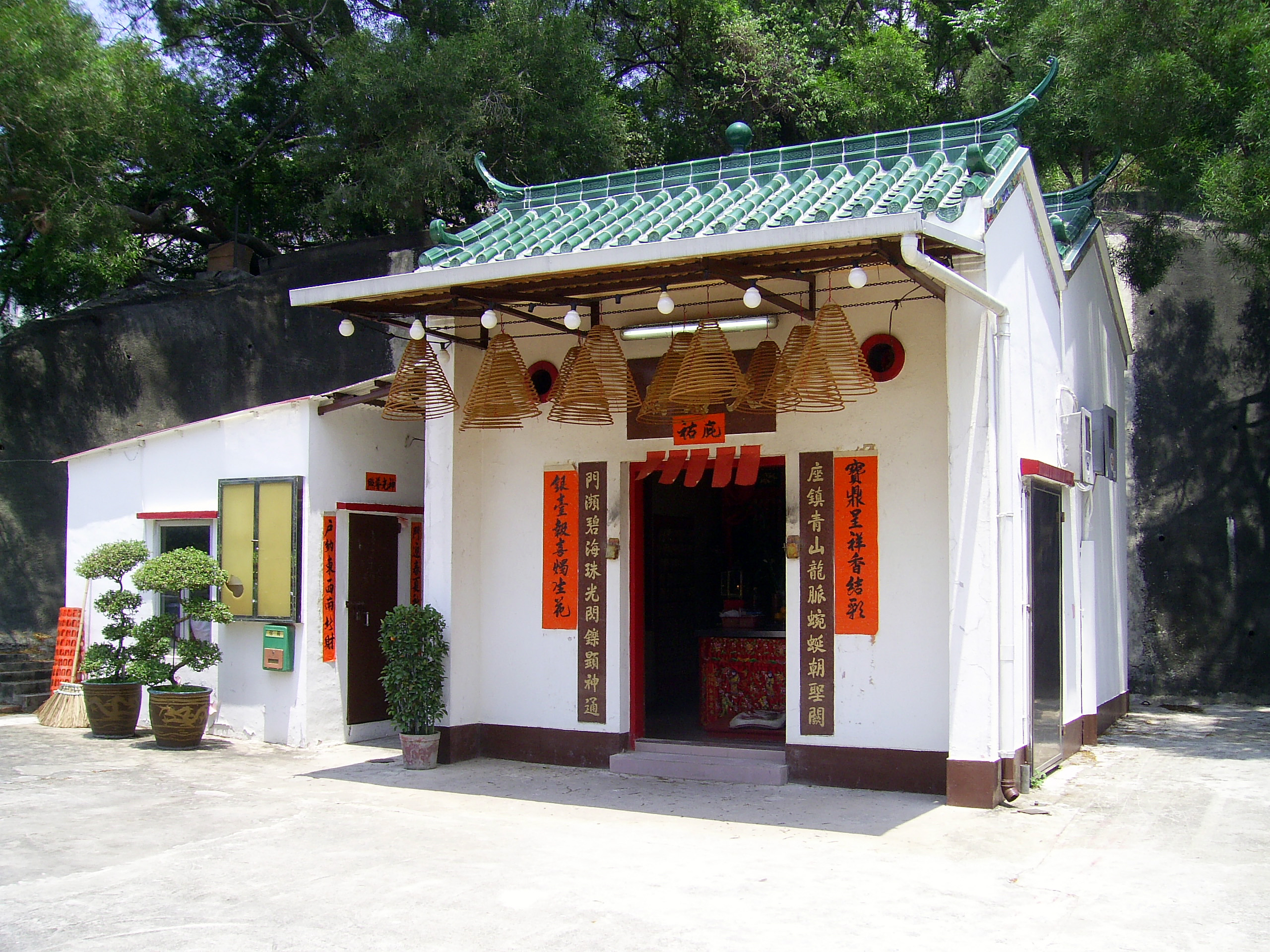 中文（香港）: 掃管灘天后廟